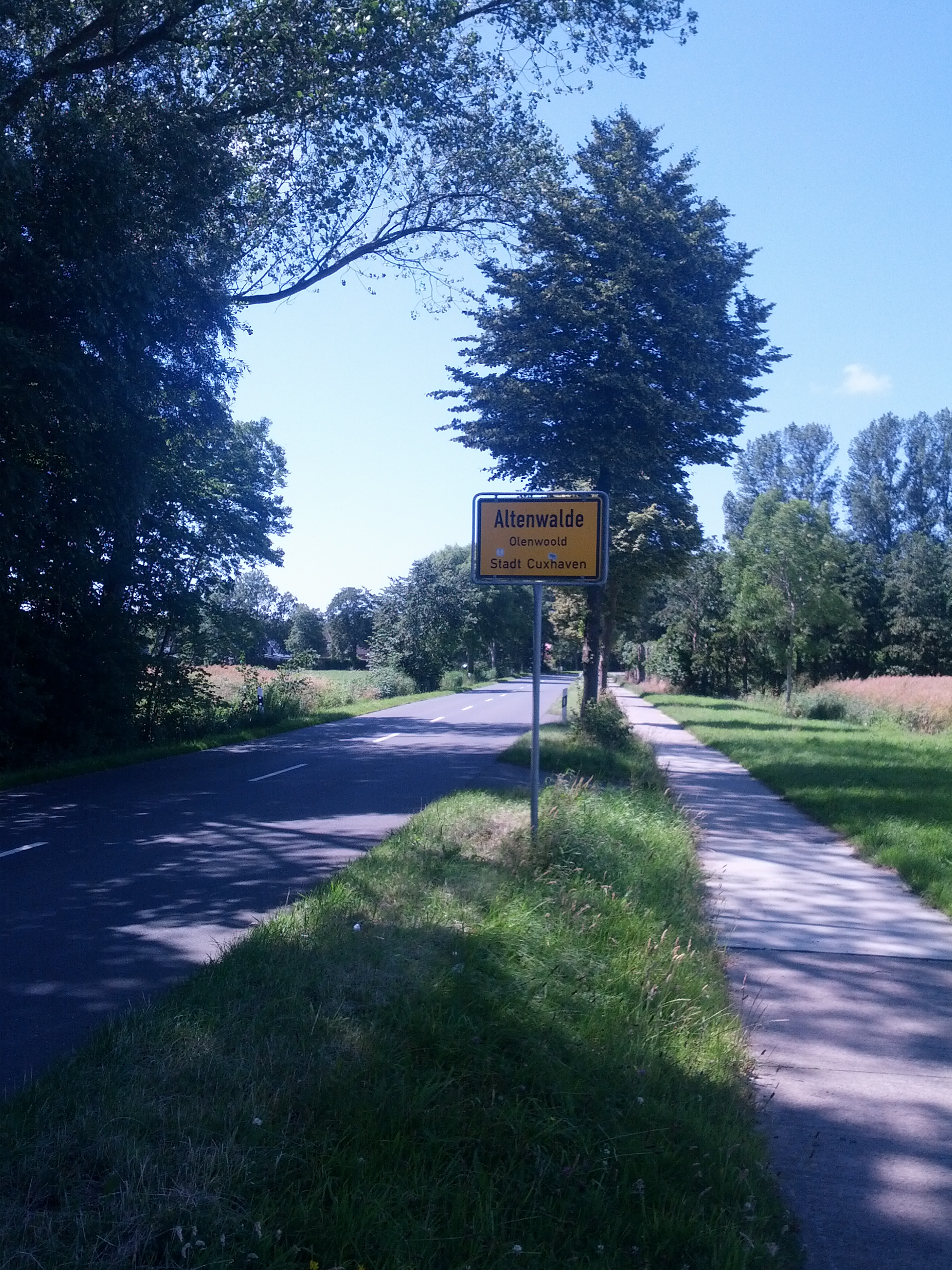 Oortsschild von Olenwoold, Landkreis Cuxhoben, mit den Naam op Hoochdüütsch un op Plattdüütsch